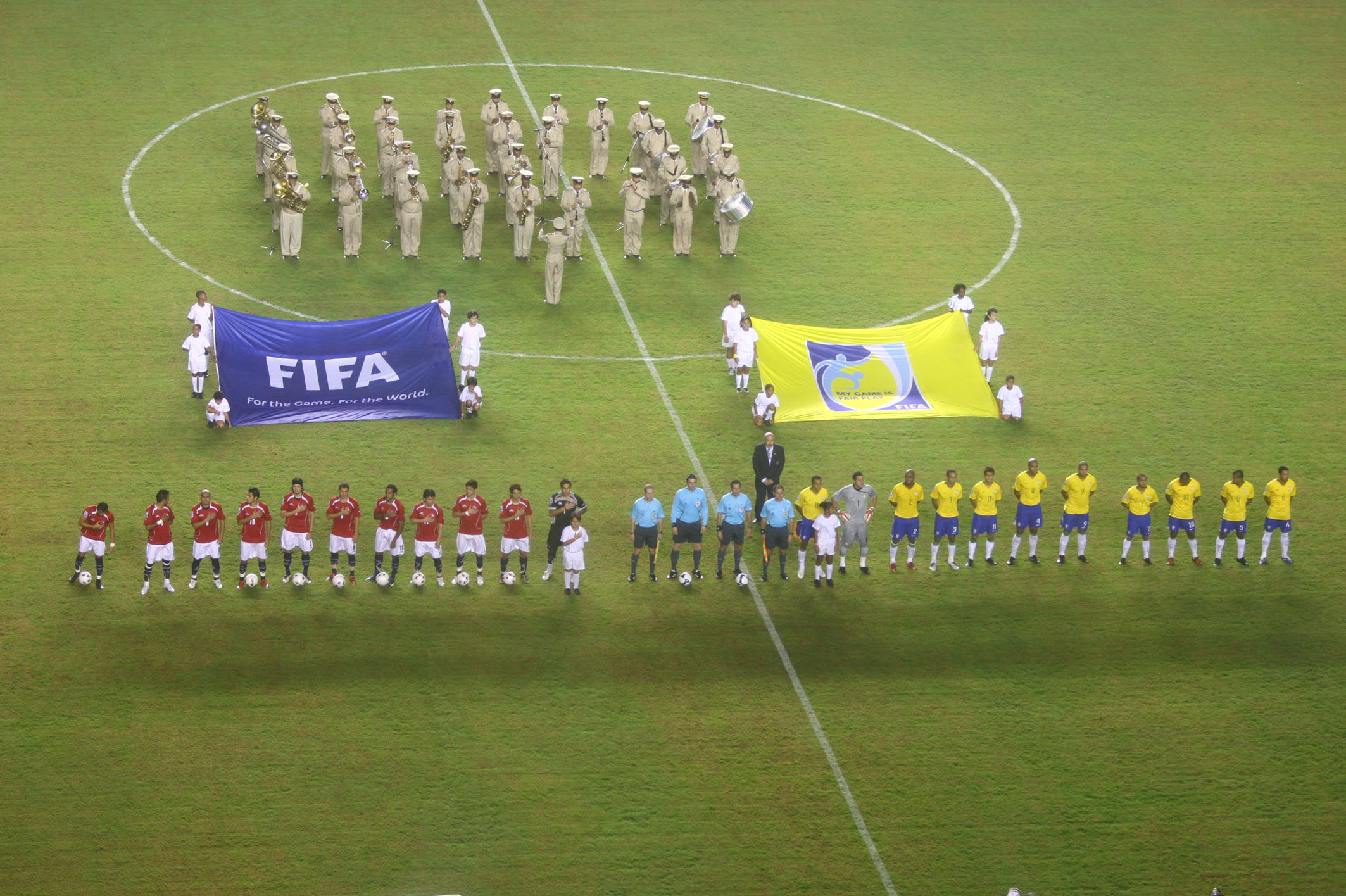 Depois da partida Brasil 4x2 Chile, nesta quarta-feira (9), a avaliação é que Pituaçu está realmente entre os melhores estádios do país, com toda a infraestrutura para garantir o conforto e segurança dos torcedores. Foto: Manu Dias / AGECOM